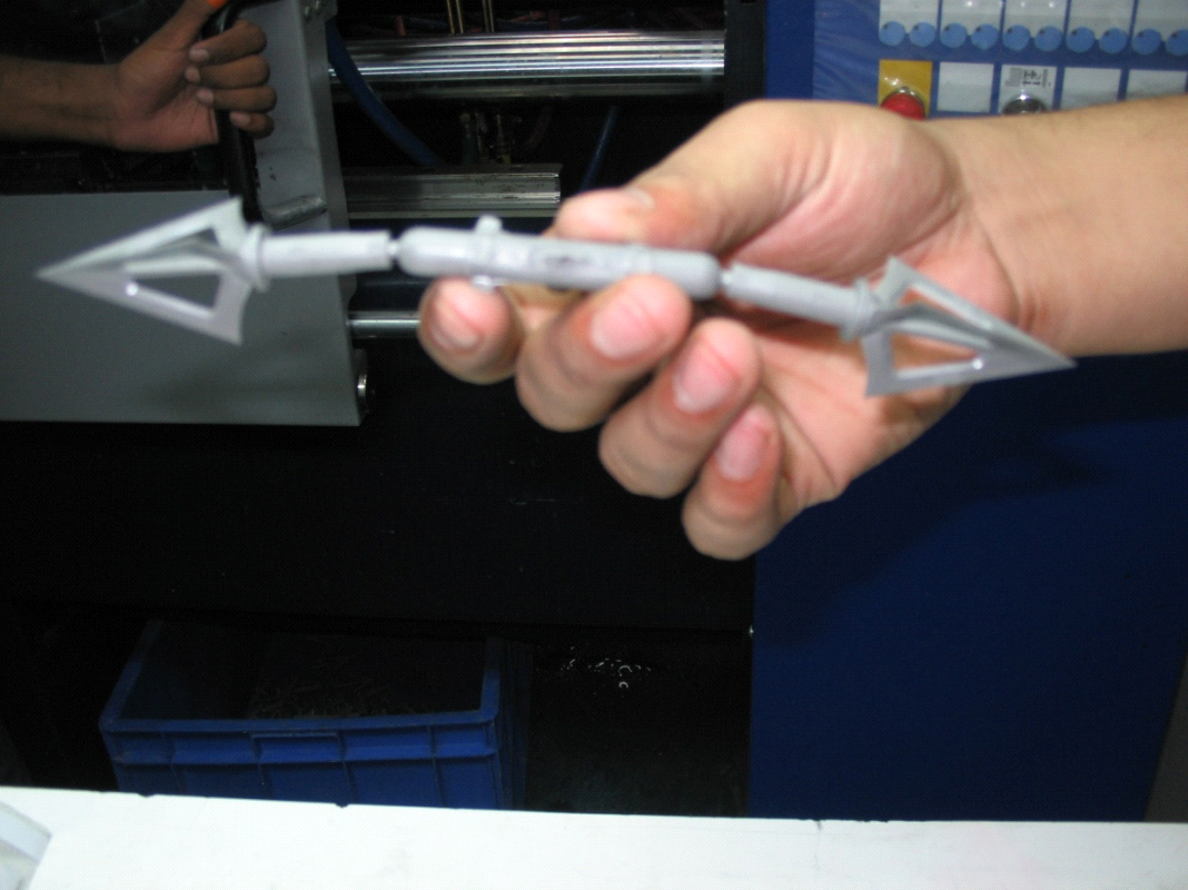 Odstříknutý výrobek "zelená fáze"